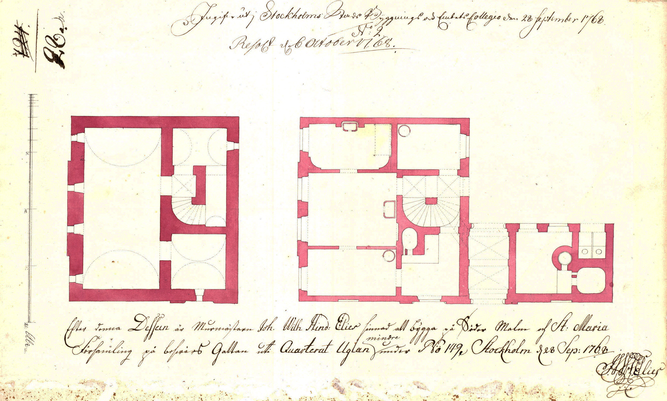 Nybyggnad i kvarteret Ugglan mindre, planritning av murmästaren Johan Wilhelm Henric Elies